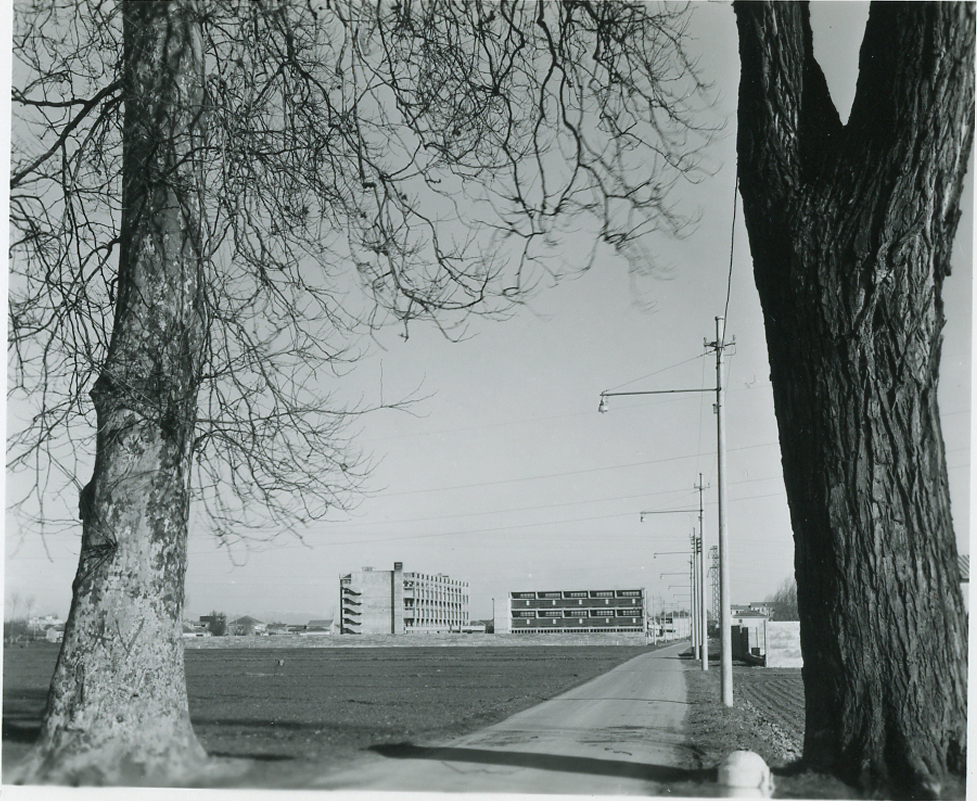 Servizio fotografico : Milano, 1975 / Paolo Monti. - Fototipi: 5 : Positivo b/n, gelatina bromuro d'argento/ carta, provino a contatto da pellicola 10x15. - ((Serie costituita da 5 provini a contatto identificati con i nn.: 186-190. La suddetta serie è contenuta nella scatola identificata con la numerazione 07. Sul coperchio iscrizione manoscritta a pennarello: "Contatti architet. 6x6".